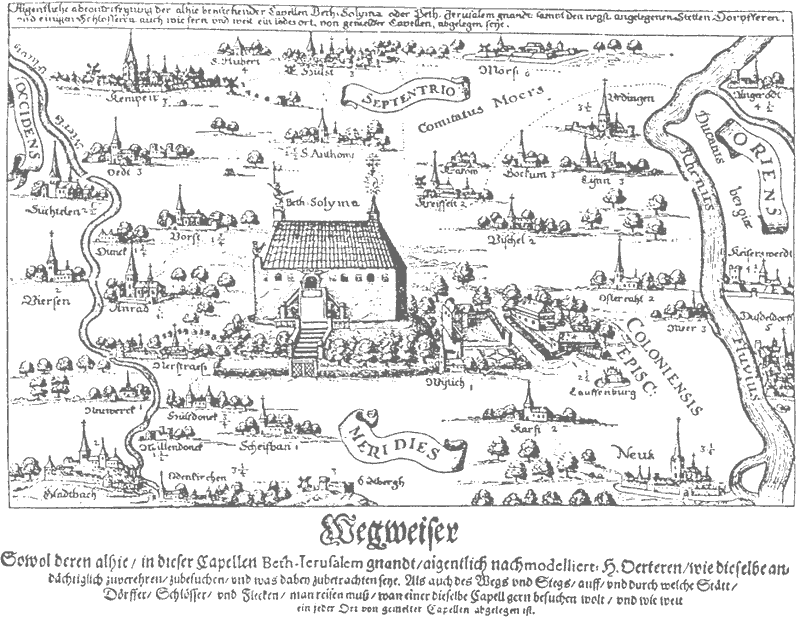 Wegweiser zur Kapelle Klein-Jerusalem in Willich-Neersen.